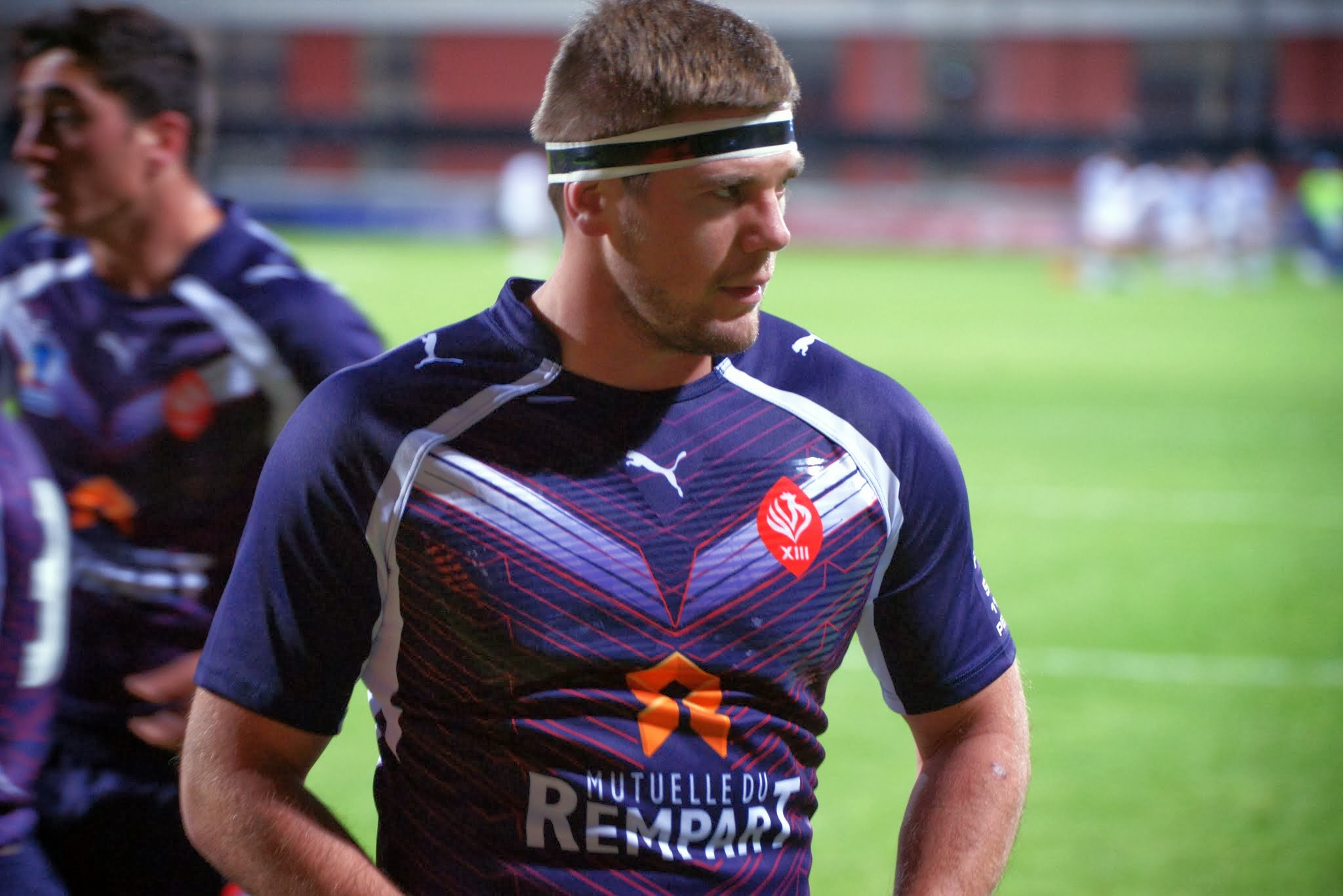 Remi Casty en Coupe du monde avec l'équipe de France